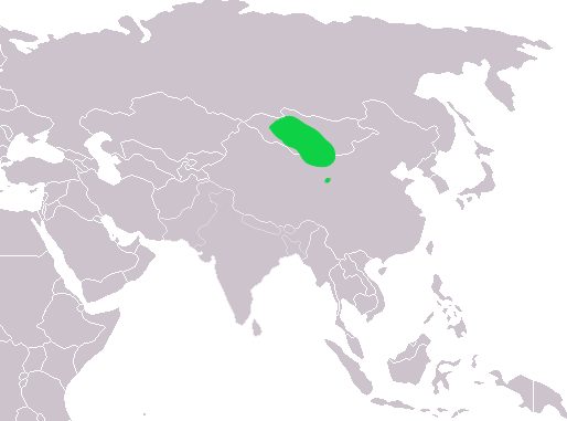 Мапа поширення Prunella koslowi